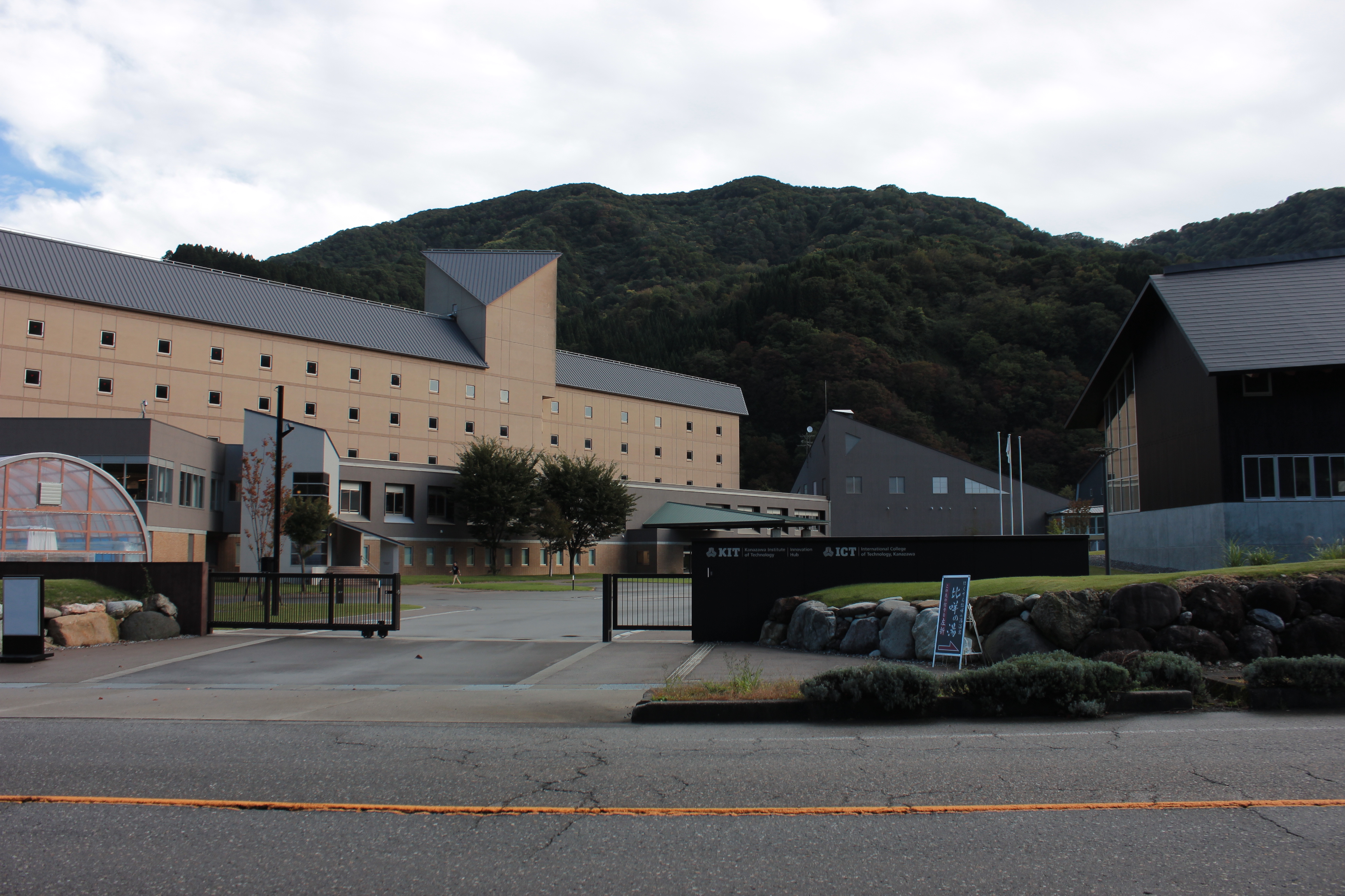 金沢工業大学・国際高等専門学校白山麓キャンパス（石川県白山市） Canon EOS Kiss X5